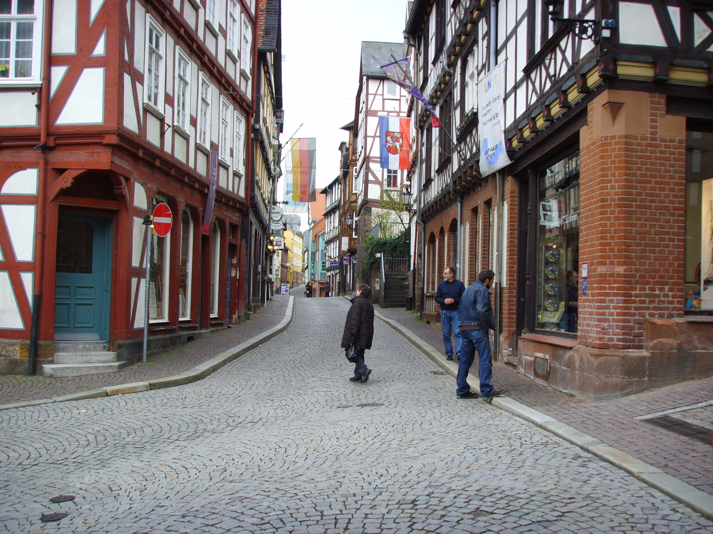 Marburg, Untergasse: die Straße folgt der historischen Ost-West-Fernverkehrsverbindung, die von Gladenbach ins Amöneburger Becken führte